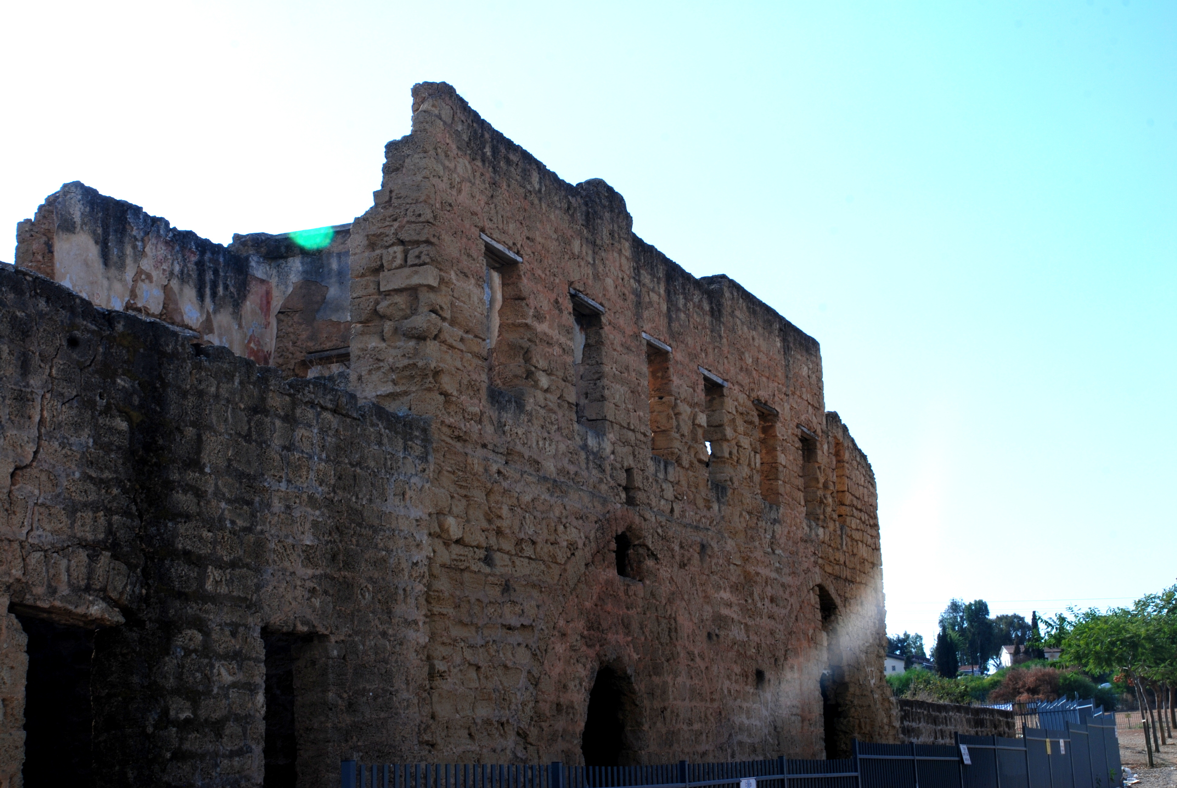 בירכת חנון (מכונה גם ביארת חנון) הוא מבנה מגורים וחווה חקלאית עתיקה של משפחת חנון בנתניה.